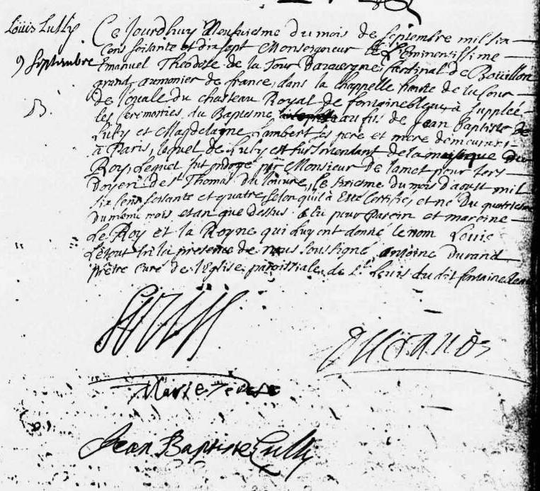 Acte de baptême de Louis Lully, fils de Jean-Baptiste Lully. On peut voir sur l'acte les signatures de Louis XIV et de la reine Marie-Thérèse, parrain et marraine de l'enfant, et de Jean-Baptiste Lully.